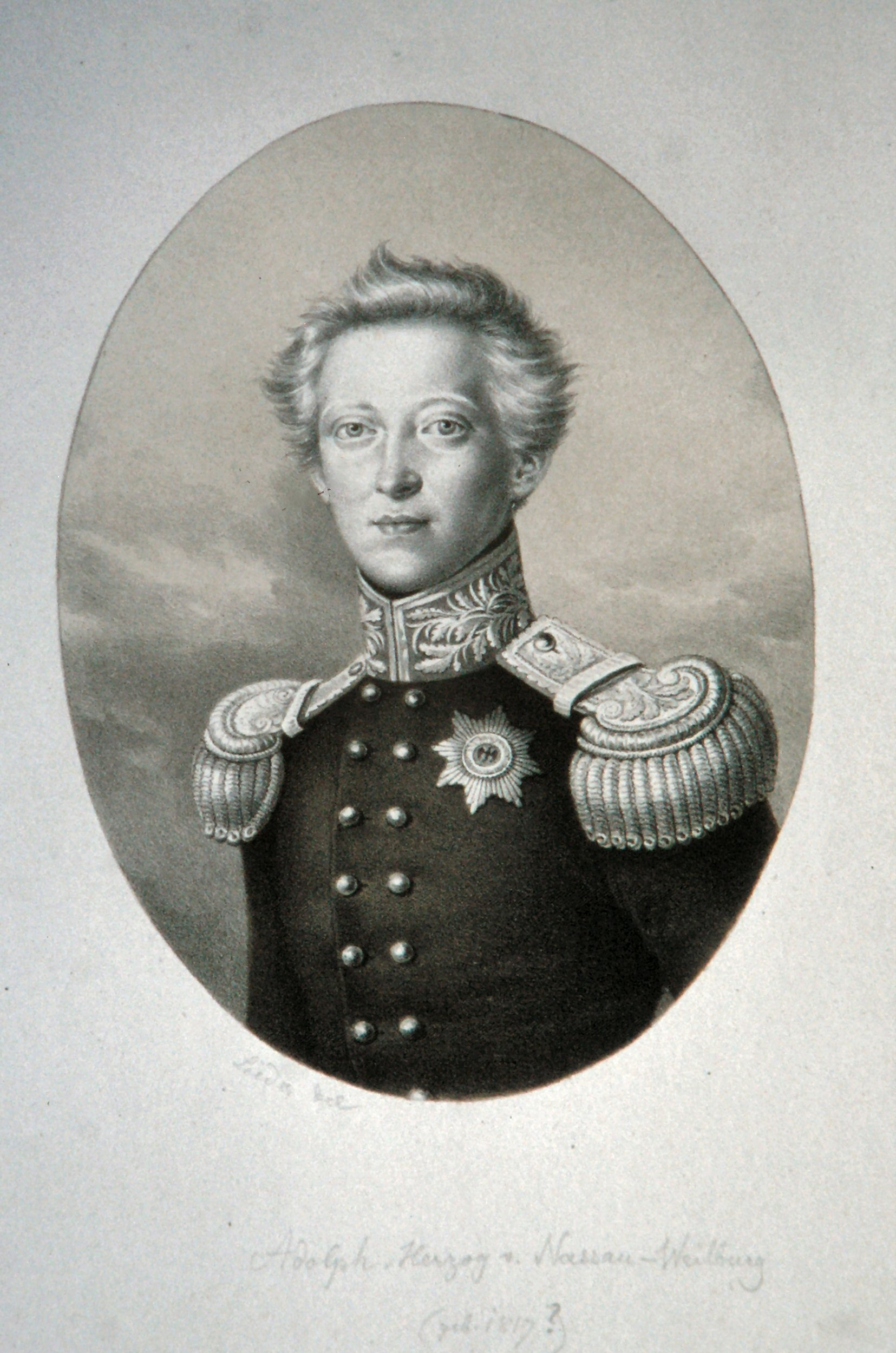 Adolf, Herzog von Nassau-Weilburg, Lithographie von Friedrich Lieder (1780-1859)